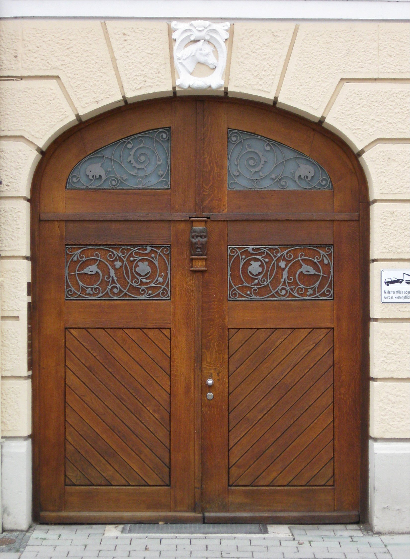 Kirchenstraße 21; Mietshaus, deutsche Renaissance, mit Erker und reichem Stuckdekor, 1898 von Ludwig Grothe; Gruppe mit Nr. 23 und 25.